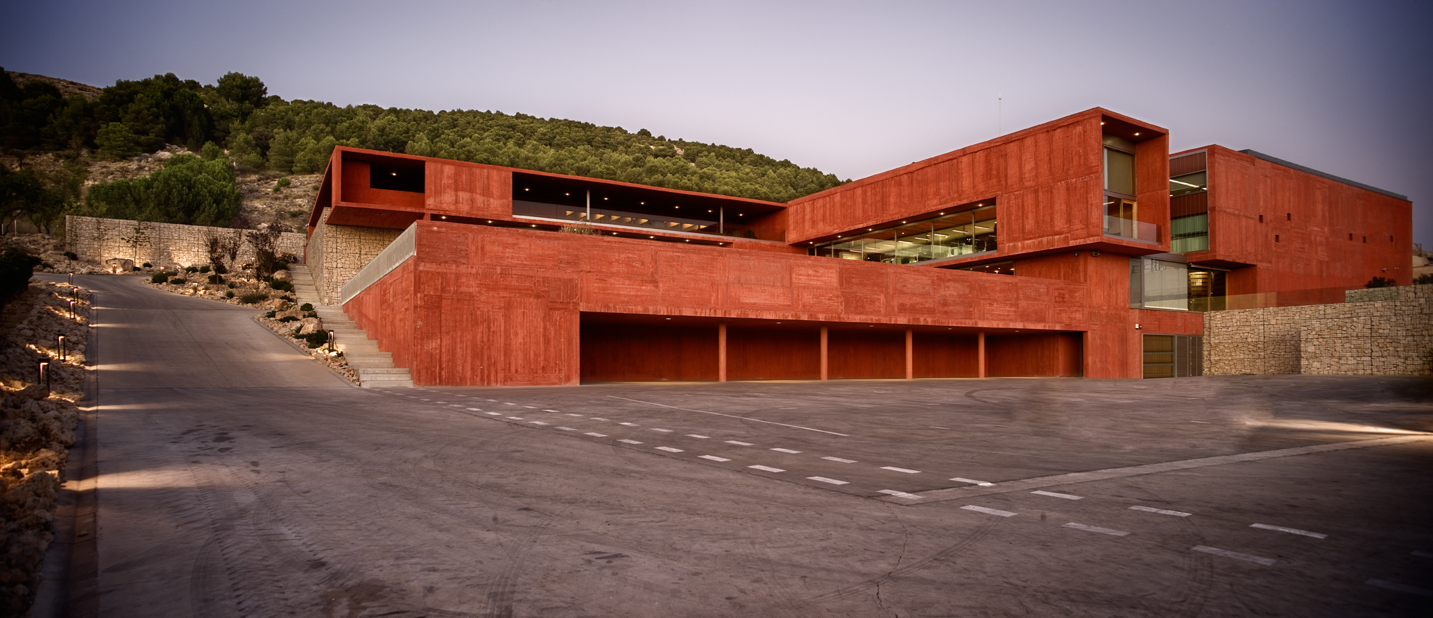 PagodeCarraovejas02